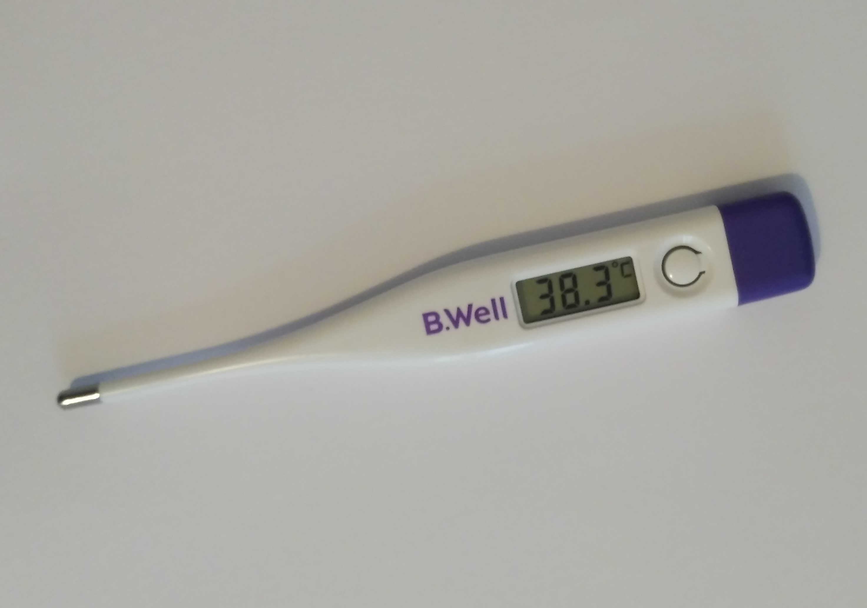 Повышенная температура тела